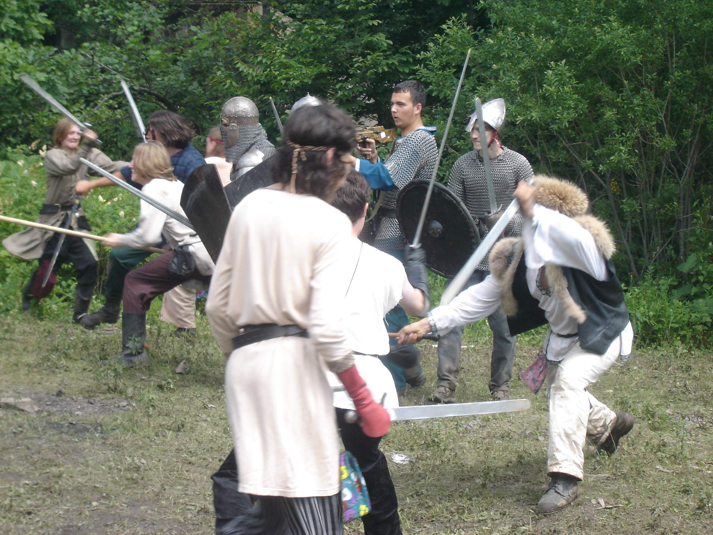 Ролевая игра по мотивам книги М. Семёновой «Волкодав» на полигоне в районе Дальхимпрома, Владивосток, 4–5 августа 2007 г.